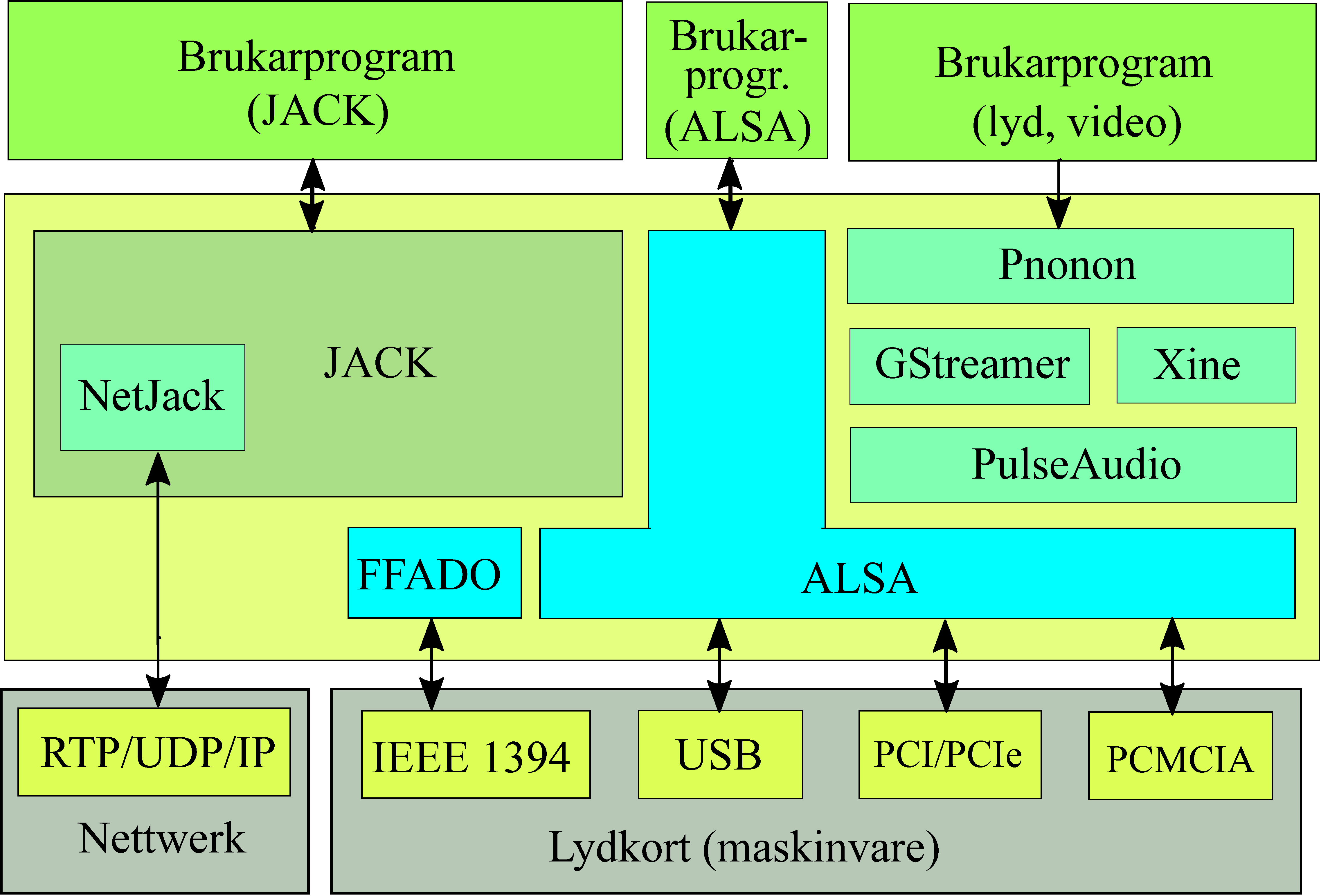 Linux-audio-infrastruktur